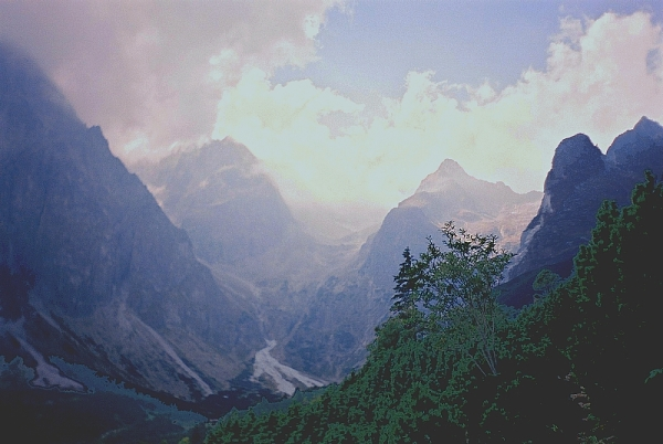 Kocioł Kieżmarskiego.